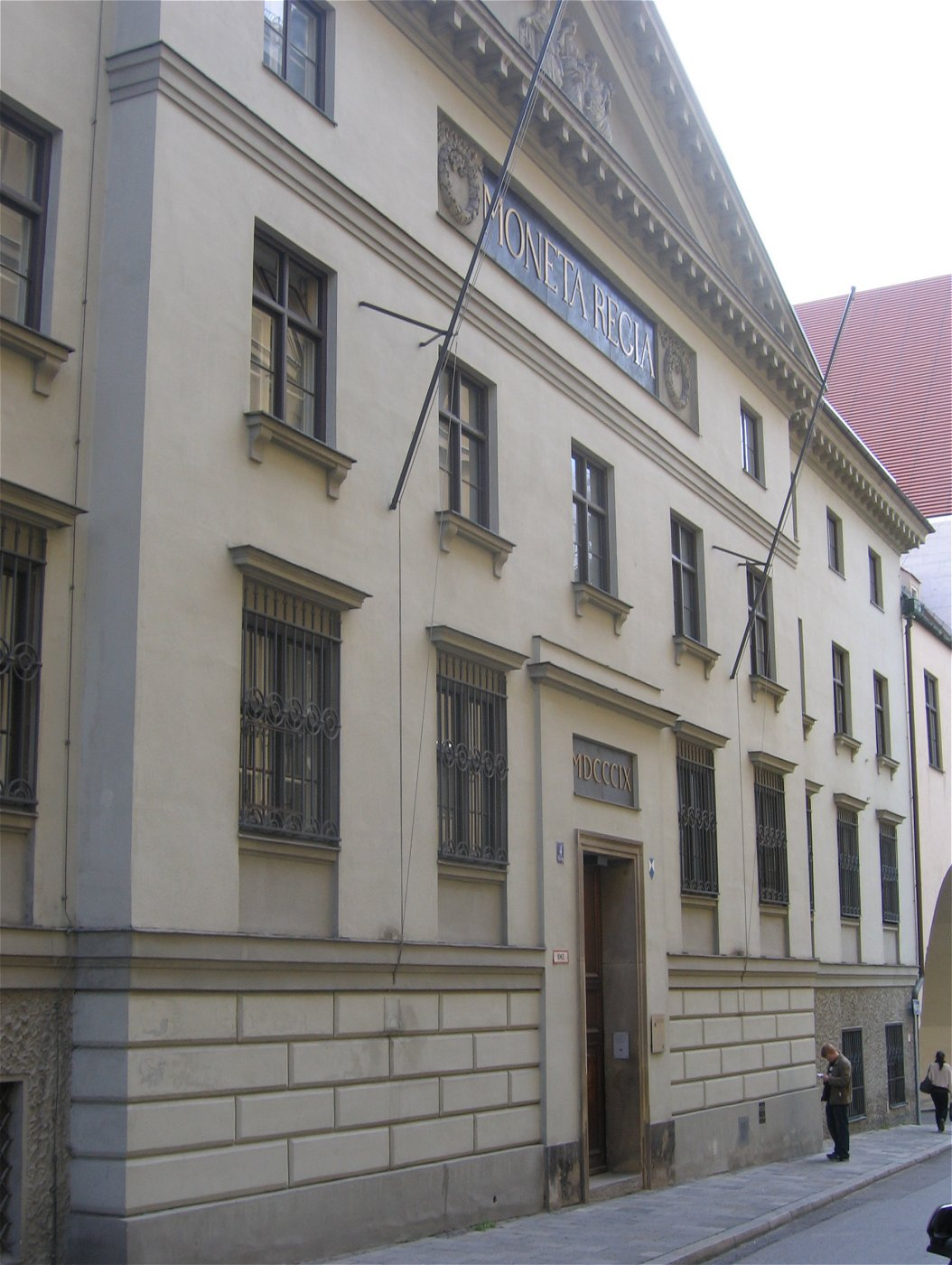 Alte Münze (MONETA REGIA) in München, Hofgraben.